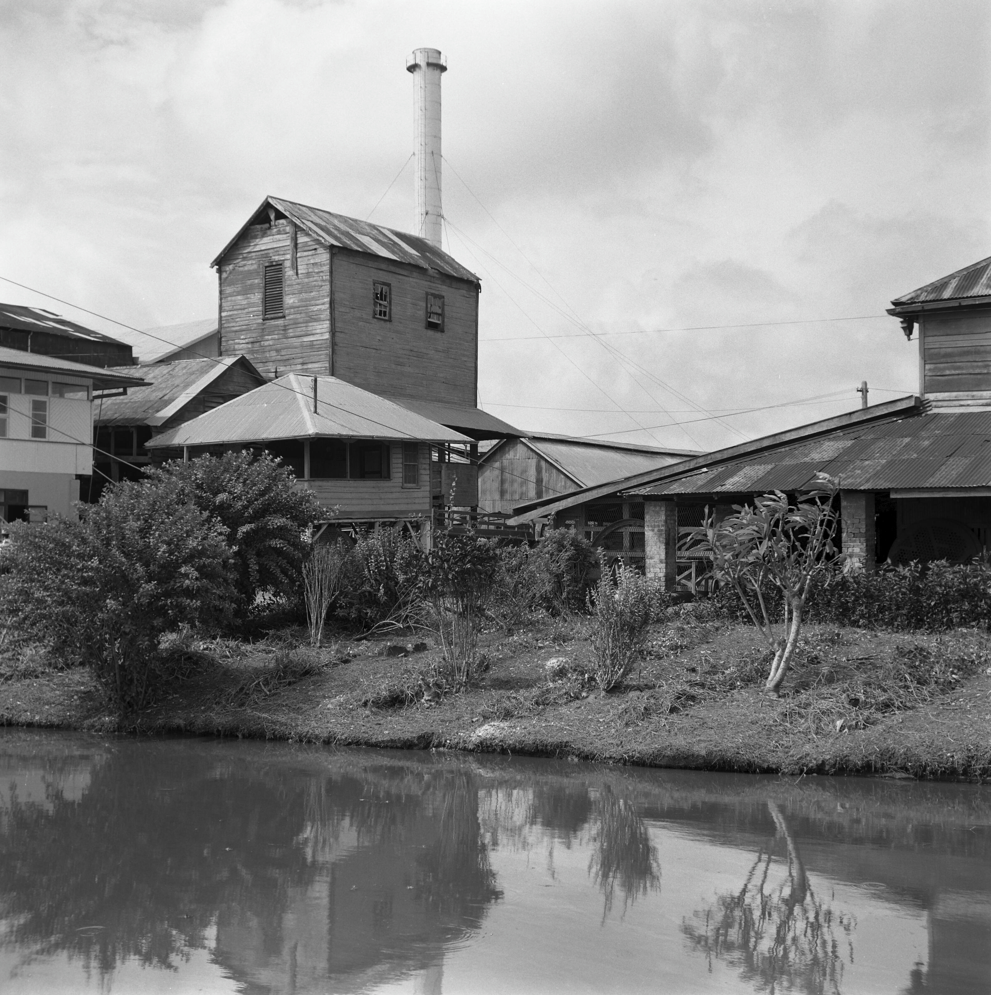 SuikerfabriekOnderwerp: suikerfabrieken